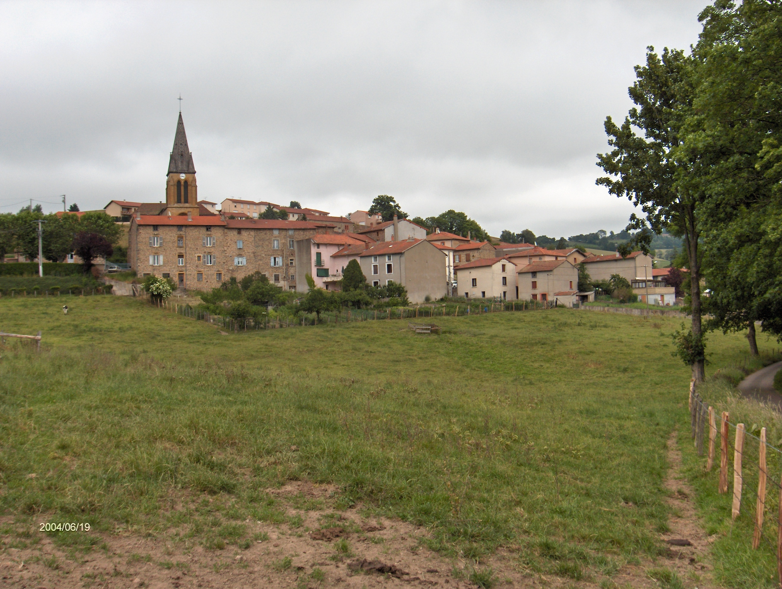 Vue générale